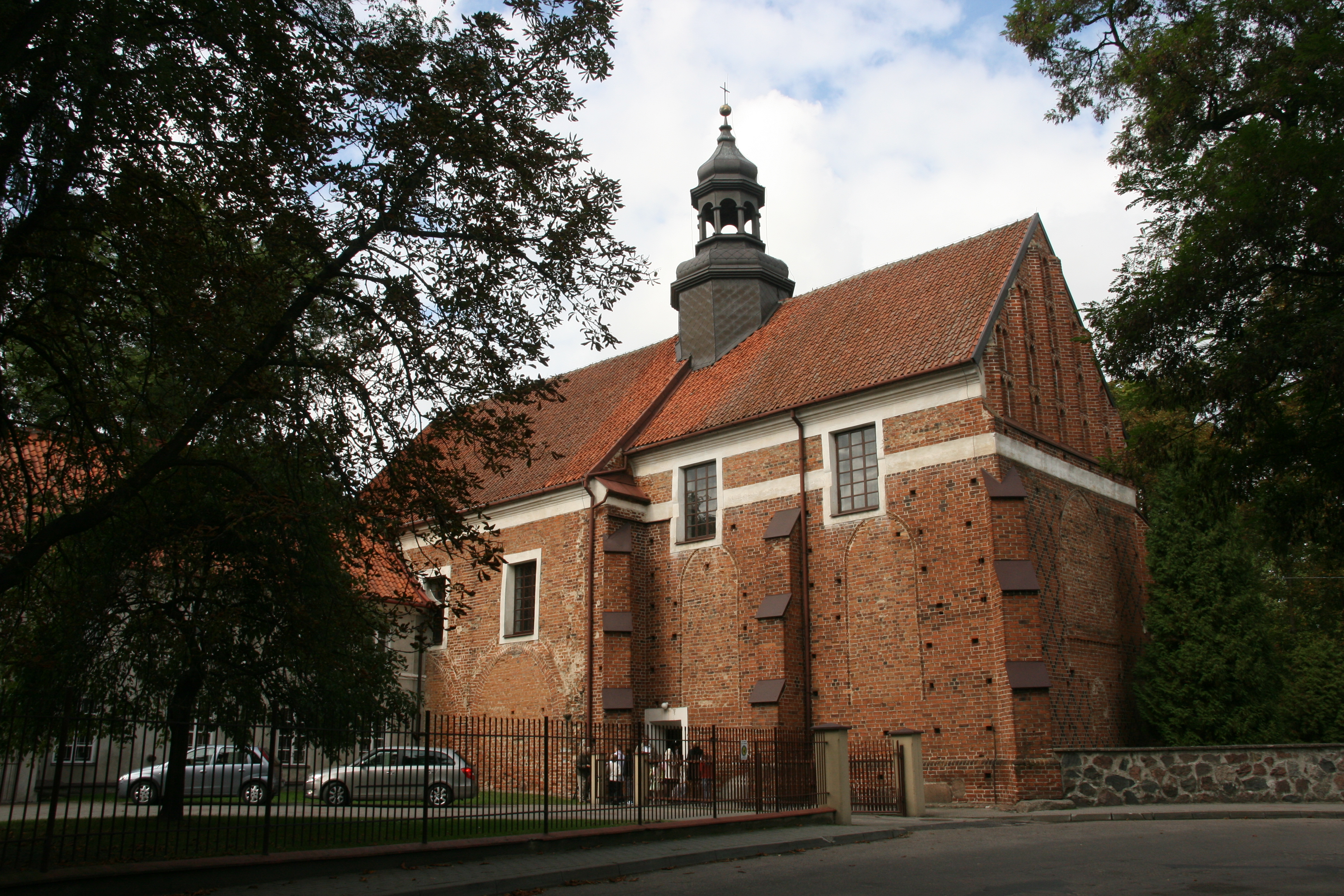 Ciechanów - kościół augustianów p.w. Nawiedzenia NMP, XIV w. (zabytek nr A/91)